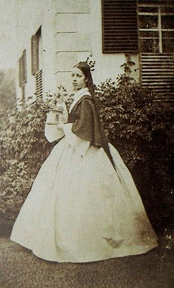 Hofdame der Kaiserin Elisabeth von Österreich-Ungarn; Aufnahme auf der Insel Madeira 1860